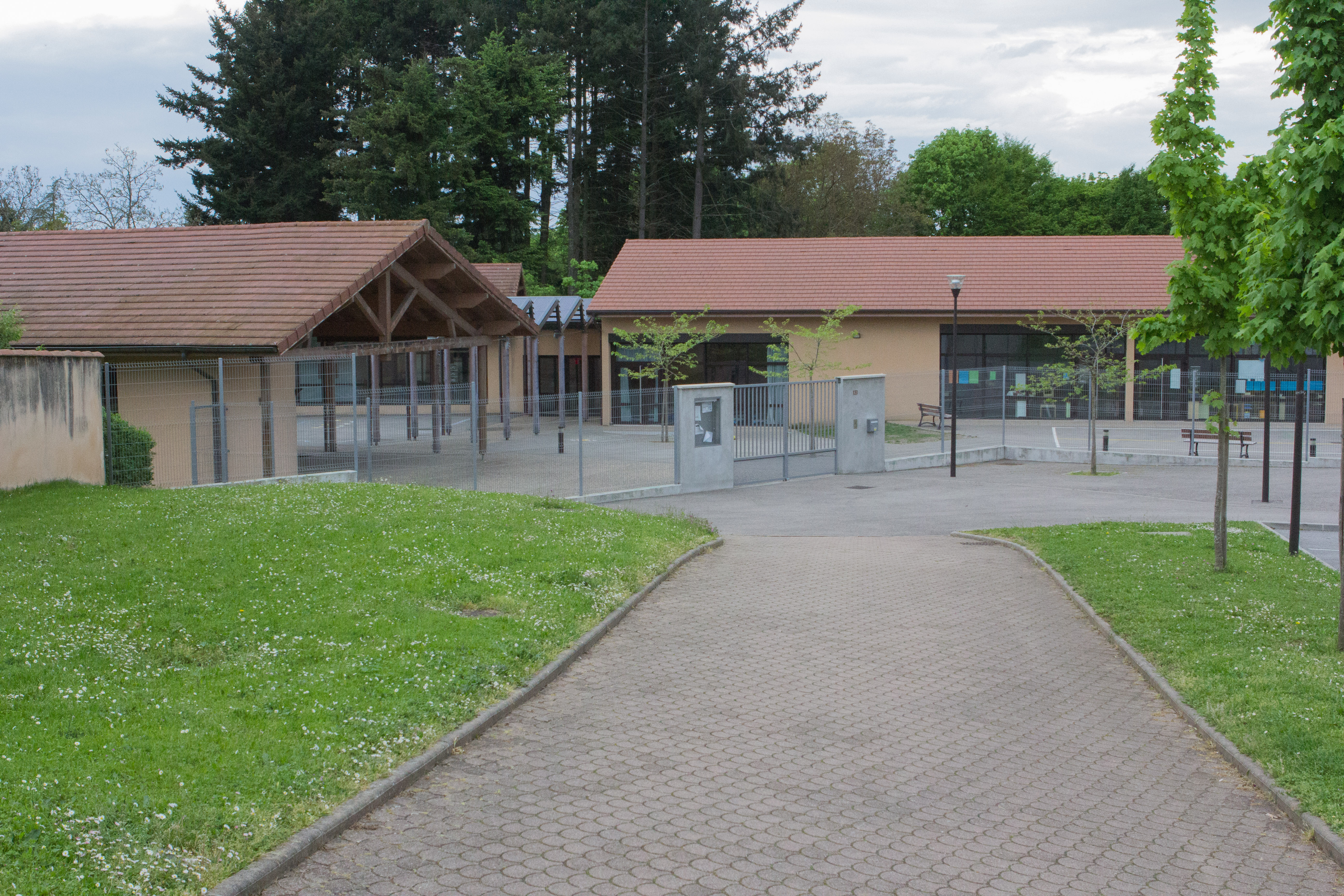 École de Bonnefamille (Isère, France)